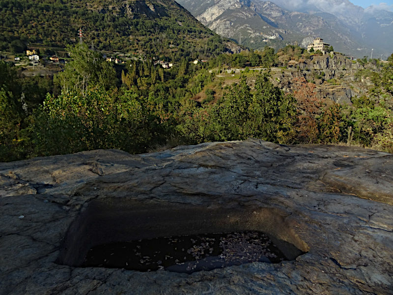 tomba barbarica a Pontey, Valle d'Aosta, Italia.